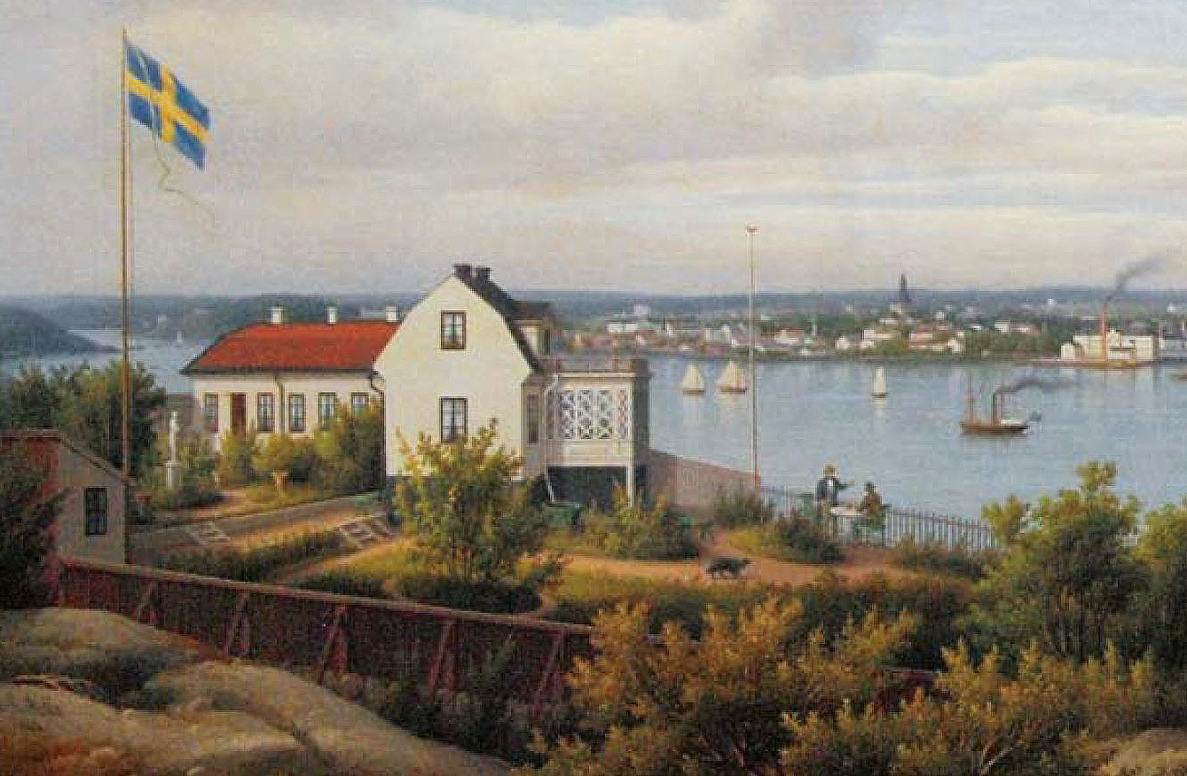 Utsnitt ur en oljemålning signerad C. A. Rothstén 1862 (Rangströmska gården)